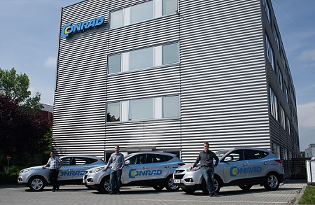 Budova Conrad Electronic Česká republika